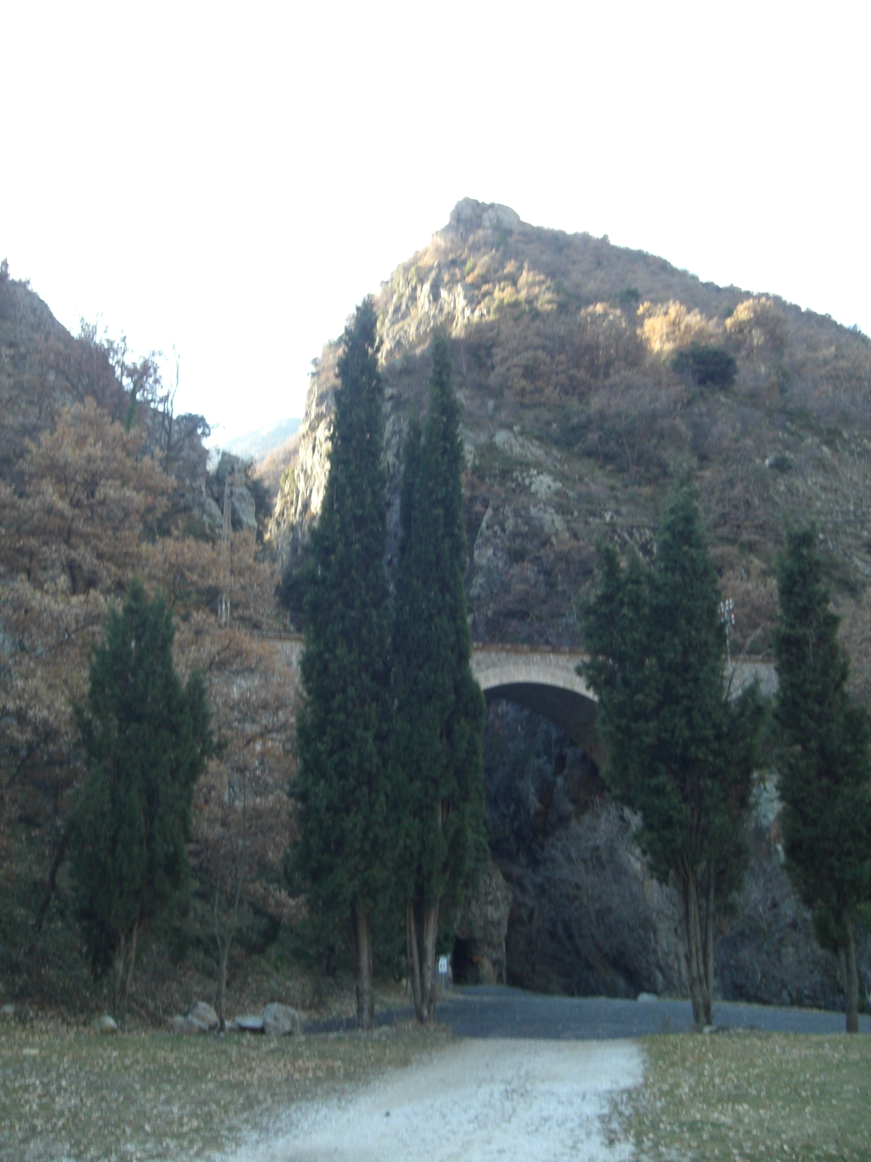 Entrada a les gorges de Carançà.